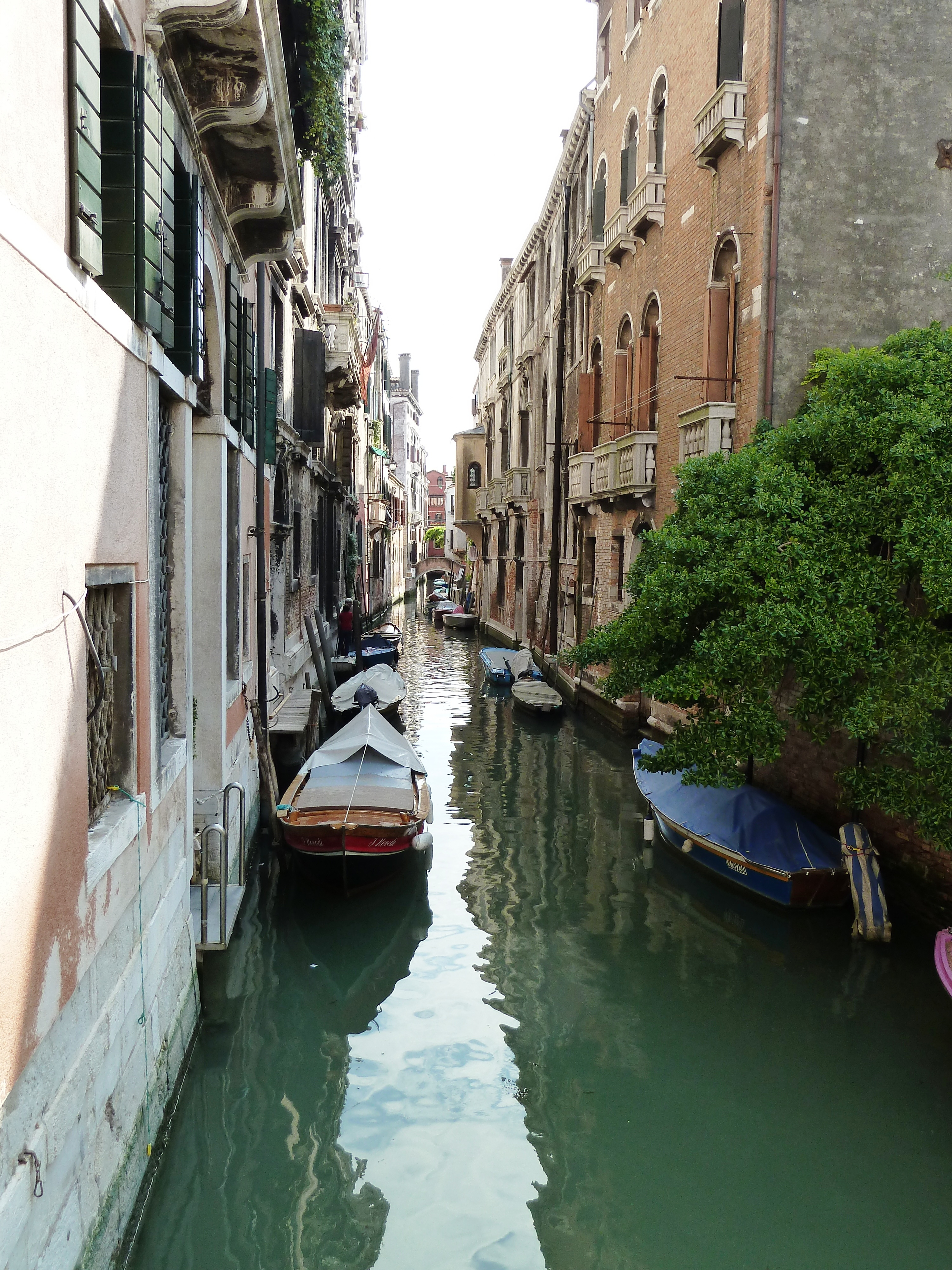 Rio di San Cassiano (Venice)